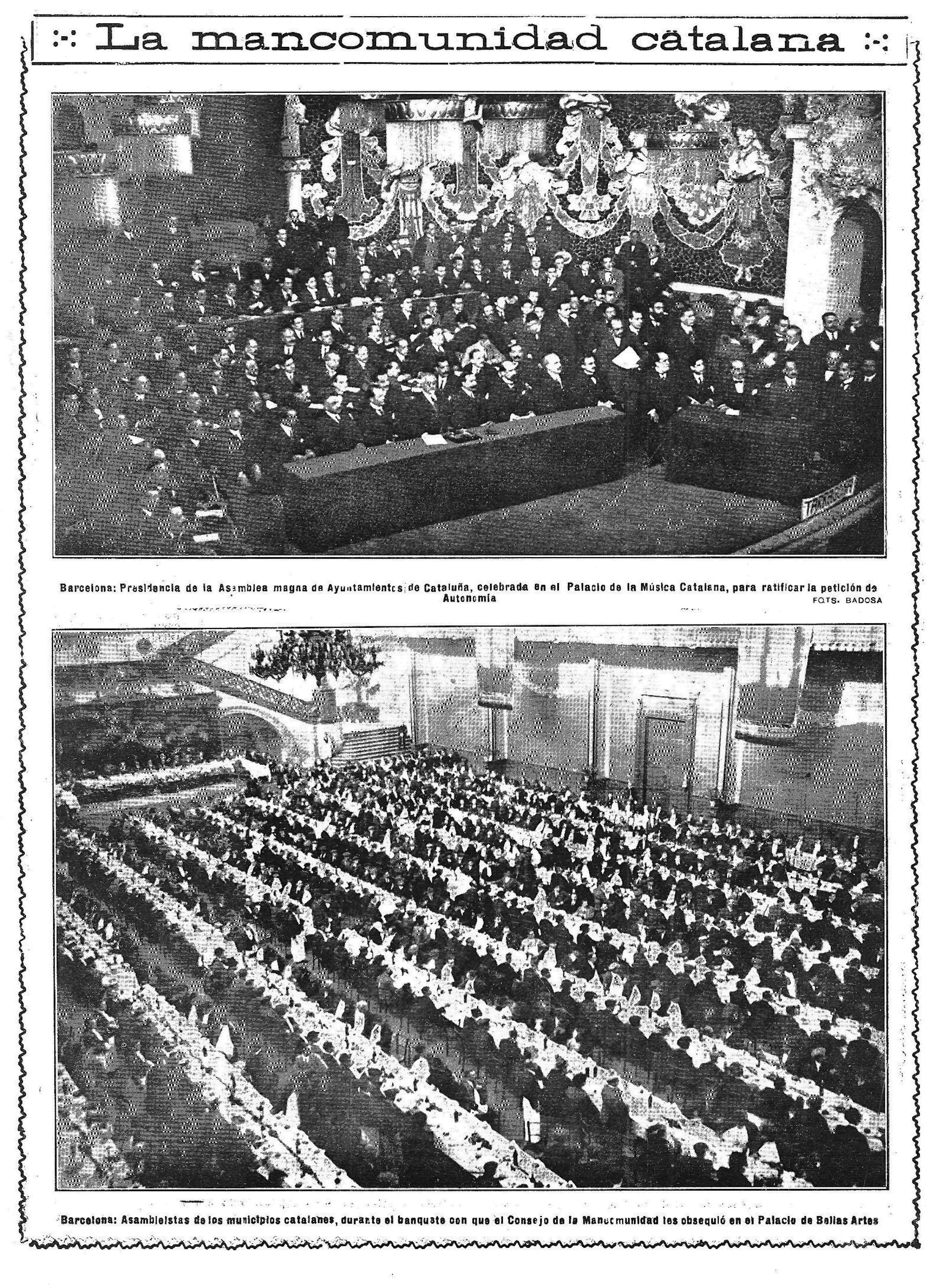 La mancomunidad catalana.